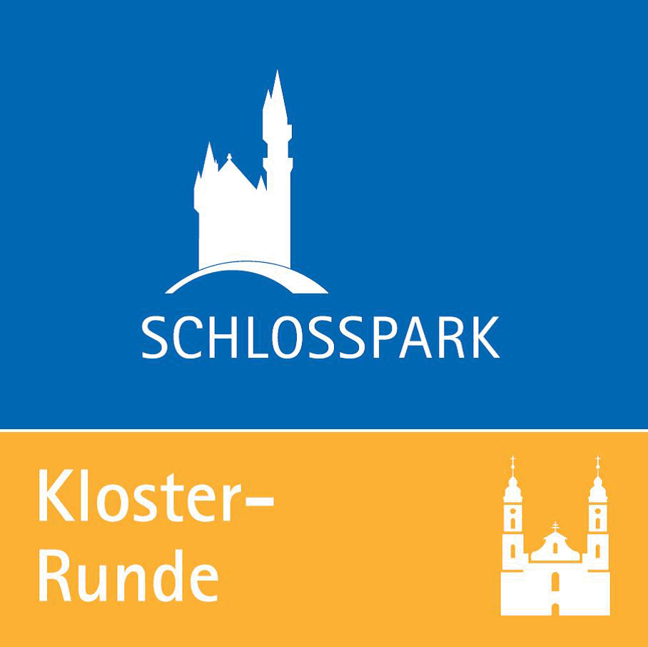 Logo Kloster-Runde